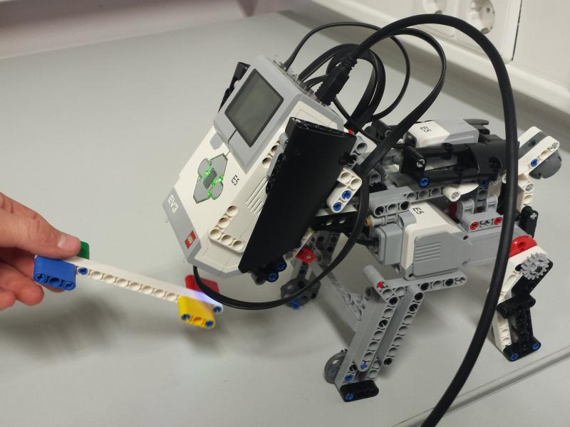 Tag A3 Puppy (Hund)